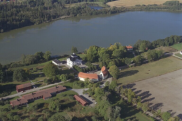 Motiv: Öster Malma Nyckelord: Flygbilder, Riksintressen Kategori: Herrgårds-/slottslandskapÖster Malma